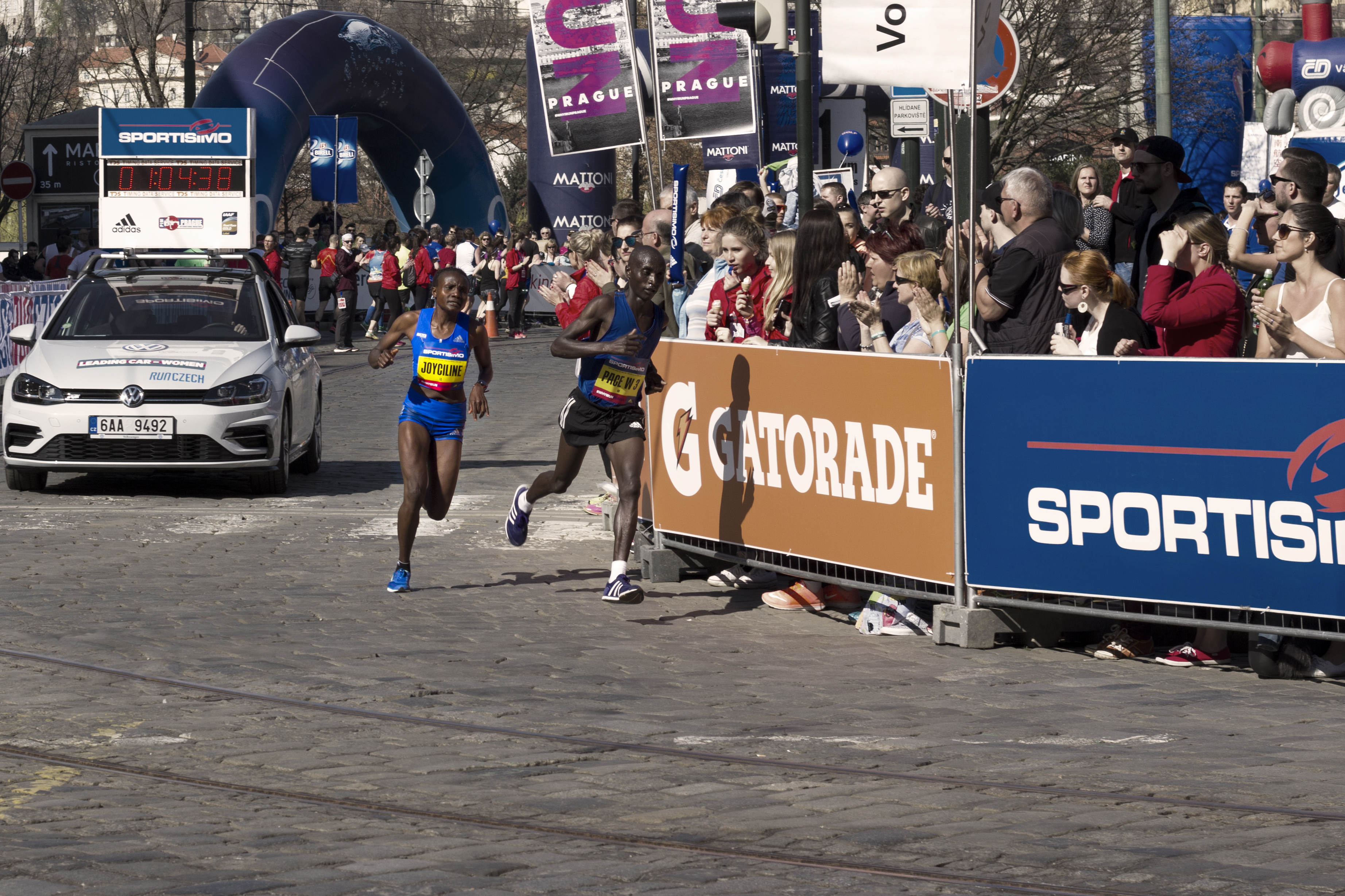 Joyciline Jepkosgei beim Zieleinlauf beim Halbmaraton in Prag am 1. April 2017. Mit diesem Lauf hällt Sie aktuell mehrere Weltrekorde.